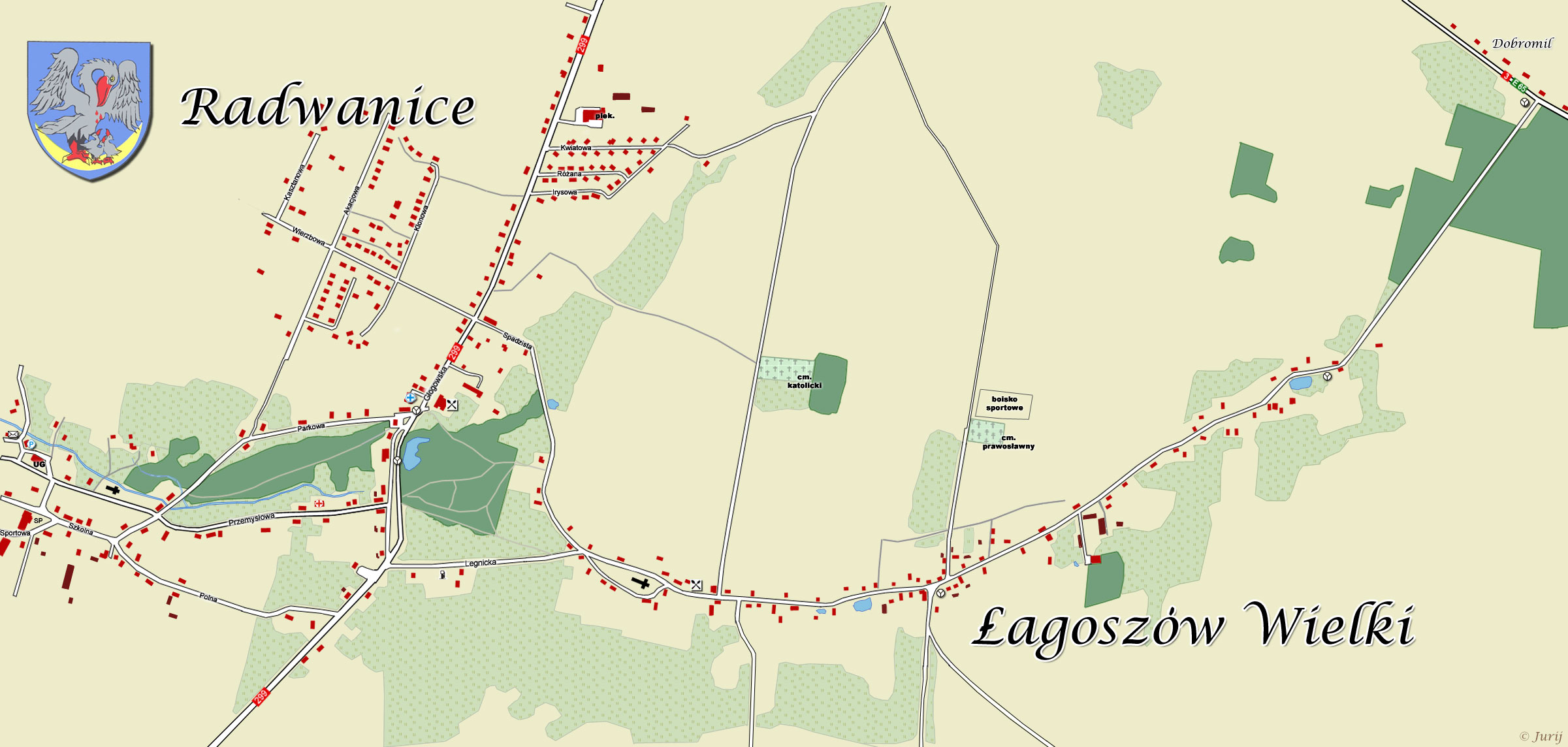 Radwanice and Łagoszów Wielki, powiat polkowicki, woj. dolnośląskie, Poland 2006 by Jurij